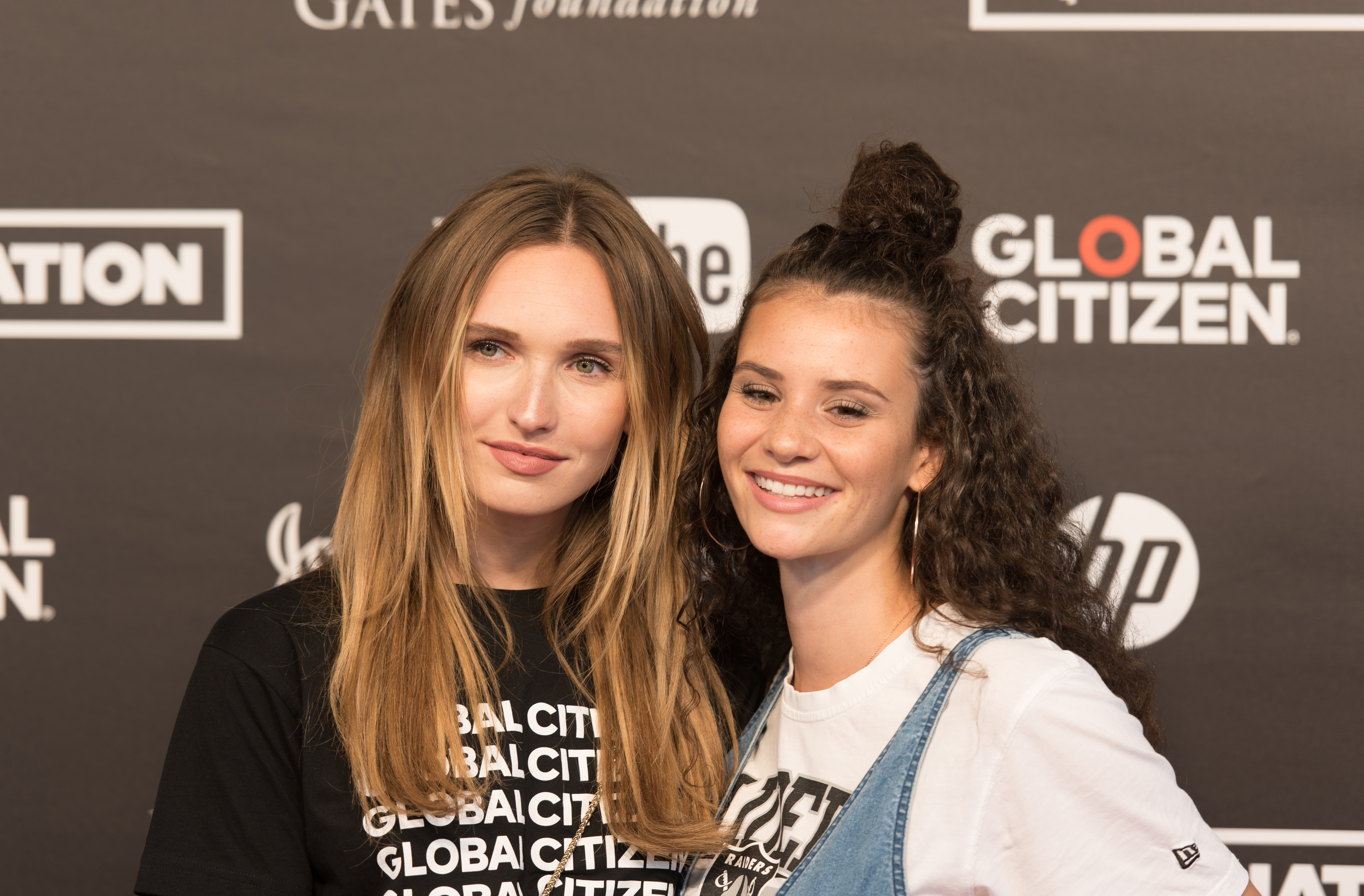 Anna Wilken mit Betty Taube-Guenter beim Global Citizen Festival in Hamburg